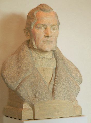 Steinbüste von Georg Ludwig Friedrich Laves im Laveshaus in Hannover Fotogenehmigung des Hausrechtsinhabers Architektenkammer Nds. liegt vor. Foto aufgenommen von Benutzer Benutzer:Axel Hindemith, Oktober 2005